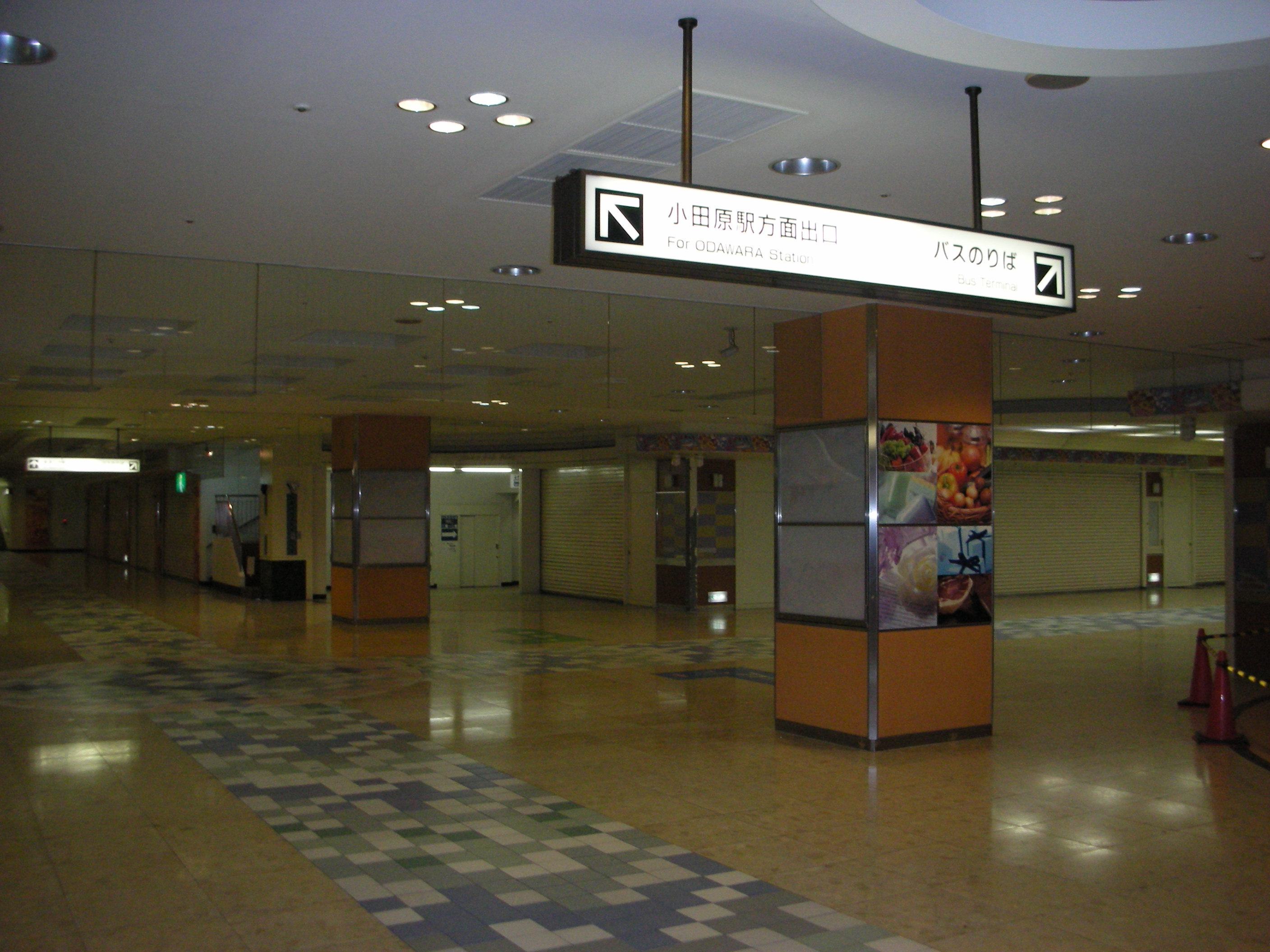 アミーおだちか（小田原地下街）の外観